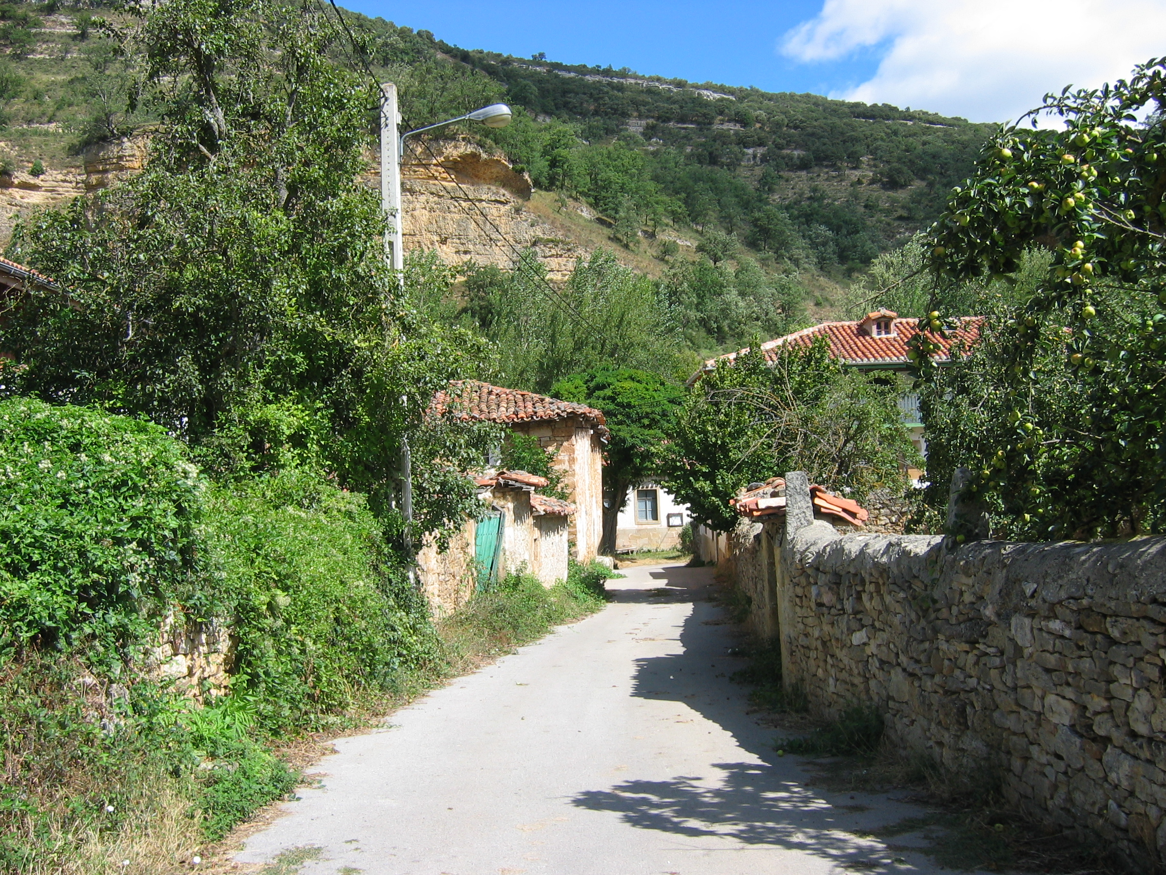 Villaescusa de Ebro, village of Cantabria